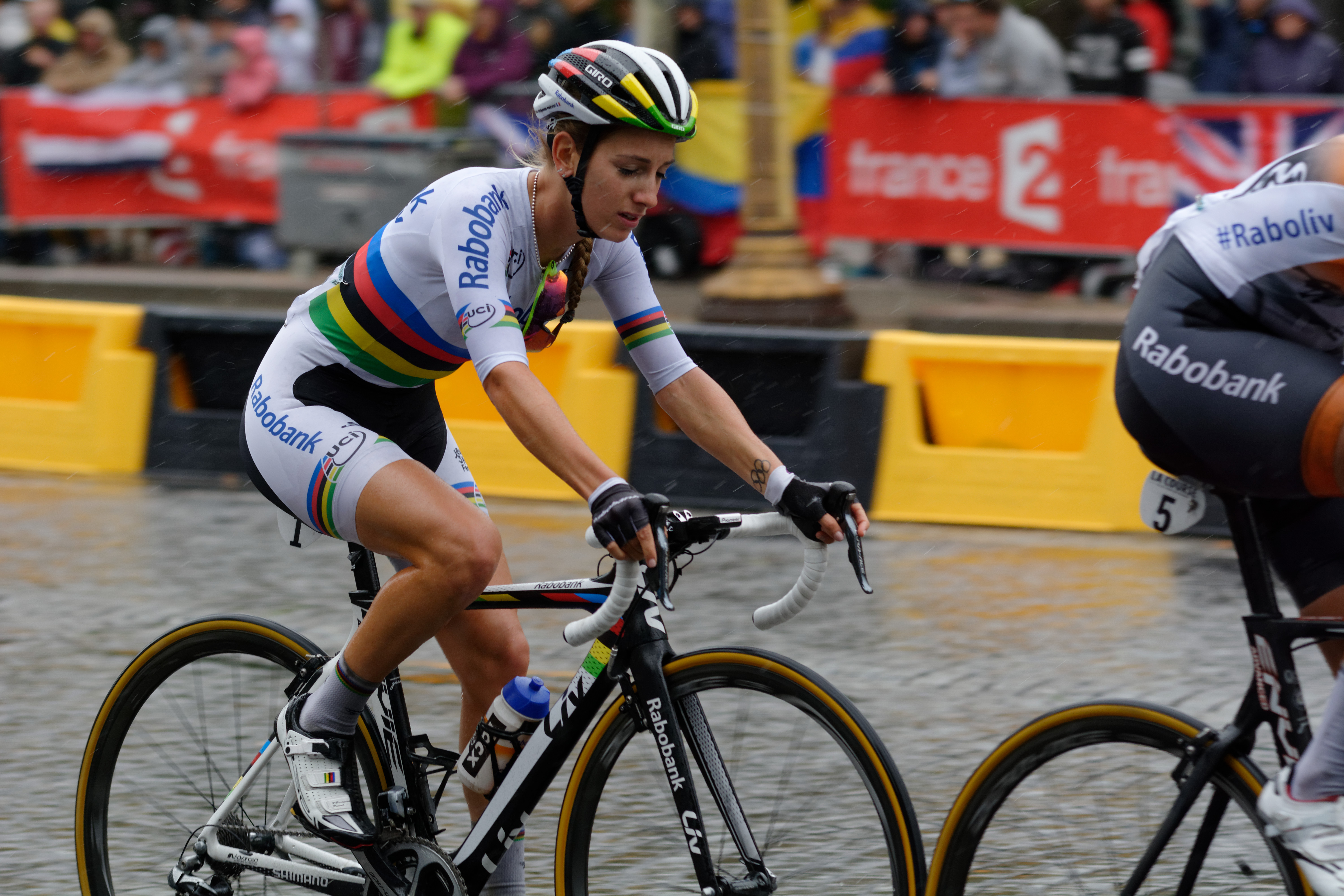 D71_1990_DxO